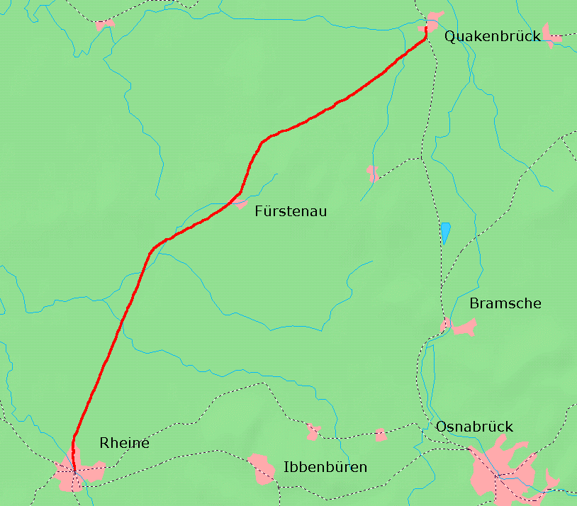 Karte der Bahnstrecke Rheine–Quakenbrück